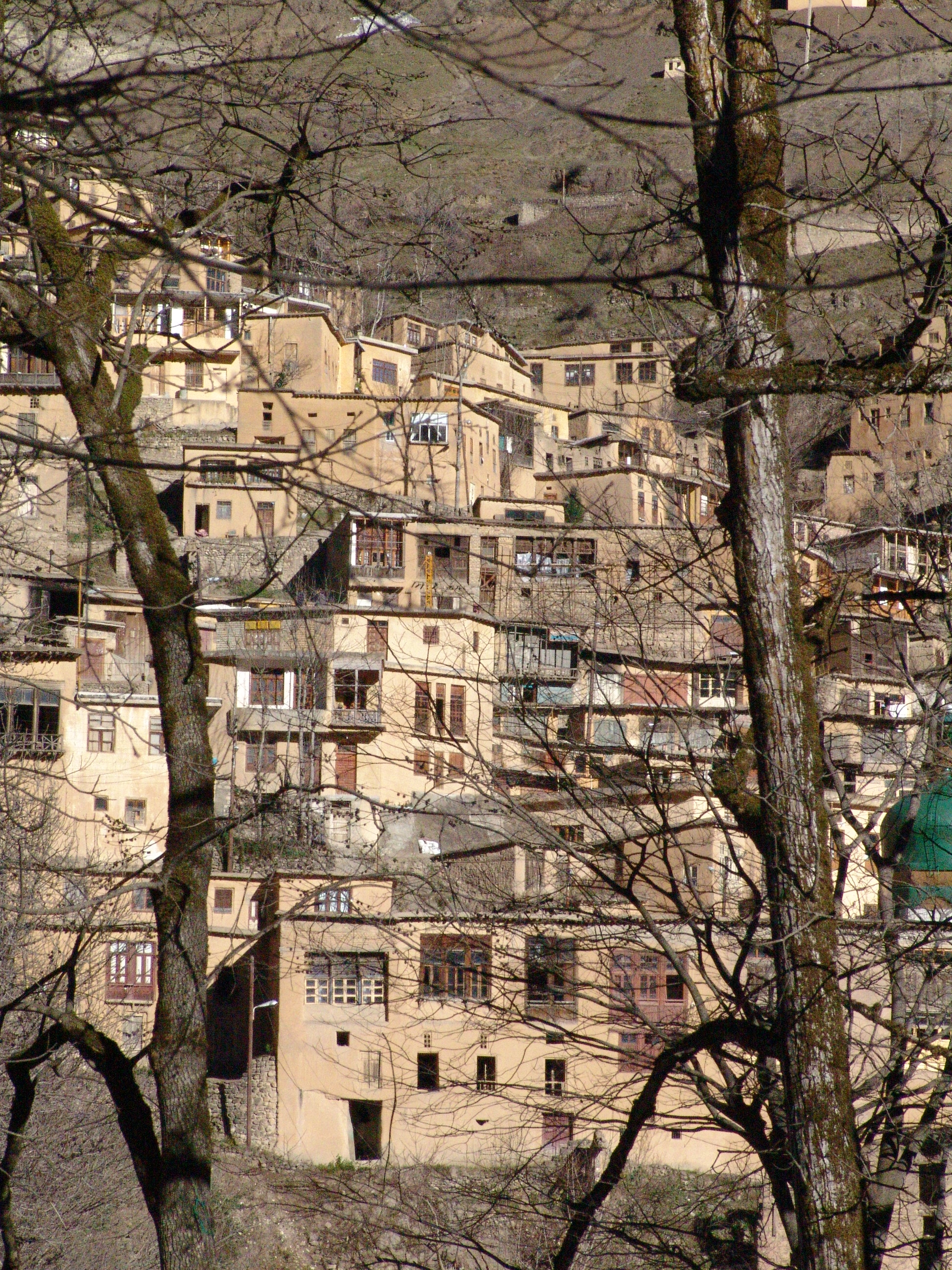 Photo de maisons dans le village de Masouleh en Iran, prise par Babak Fakhamzadeh. Image récupérée de la WP anglaise.